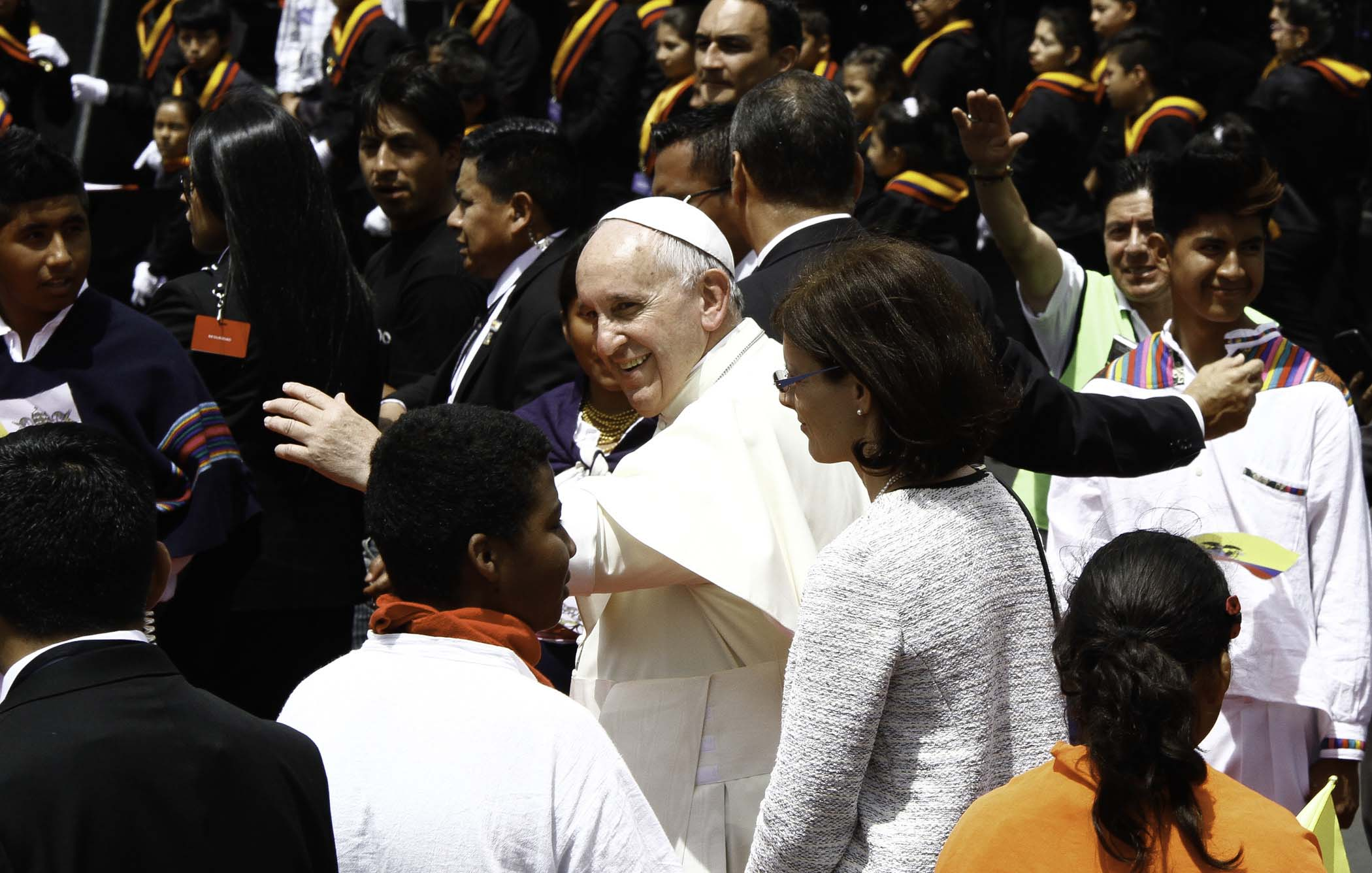 Quito, 08 jul (Andes).- El papa Francisco se despidió de Ecuador tras su visita de 4 días a las ciudades de Quito y Guayaquil. Su próxima parada será el hermano país de Bolivia. ANDES/Micaela Ayala V.